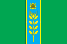 Прапор Любашевського району